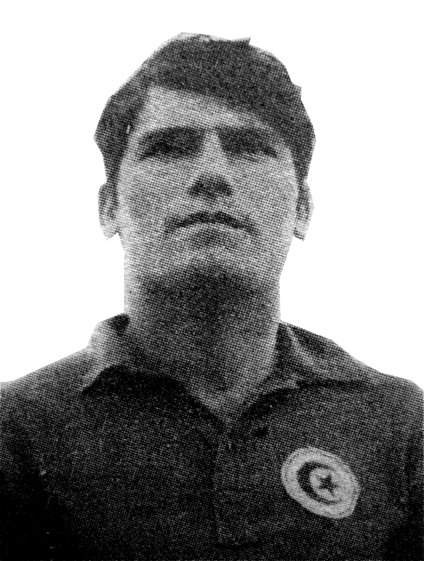 Abdelmajid Chetali, ex joueur international tunisien